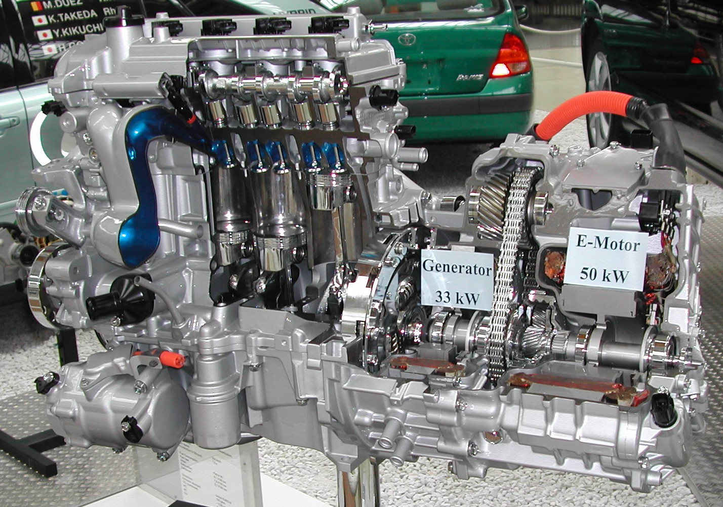 aufgeschnittenes HSD im Technikmuseum Speyer